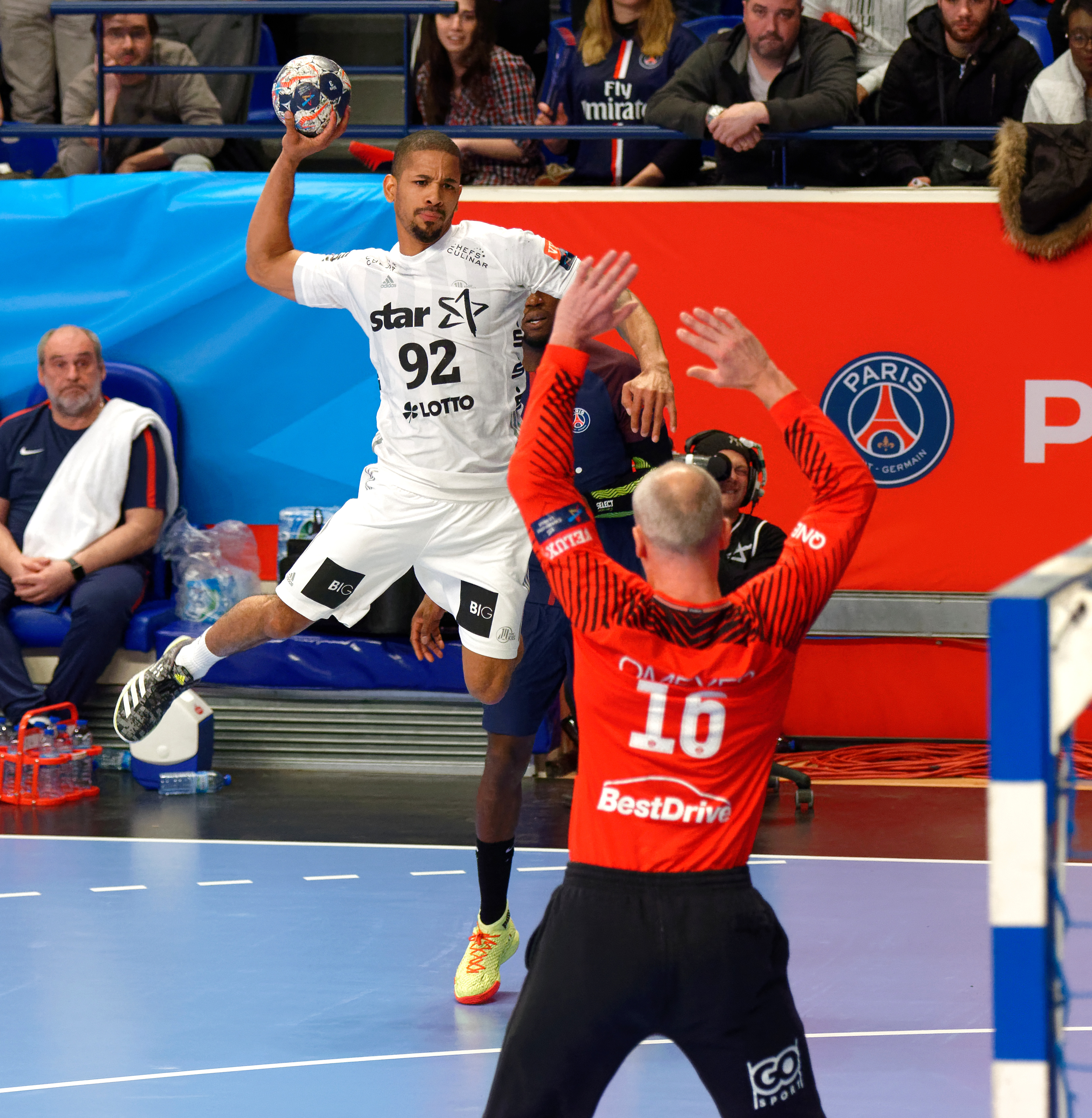 Rencontre de phase de groupe de la ligue des champions 2017/18 entre le PSG et Kiel. A Coubertin, le 4 mars 2018.